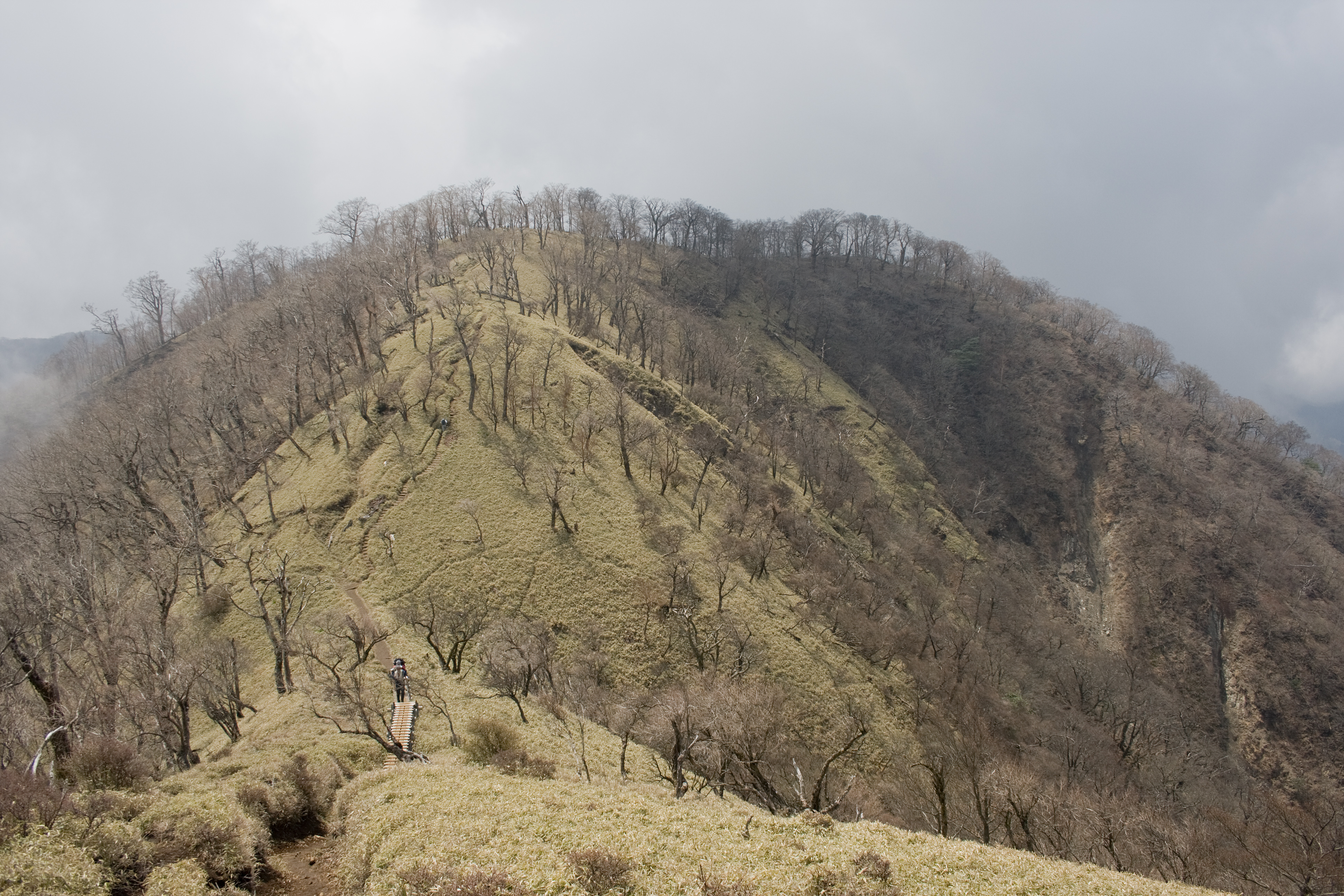 竜ヶ馬場付近より日高